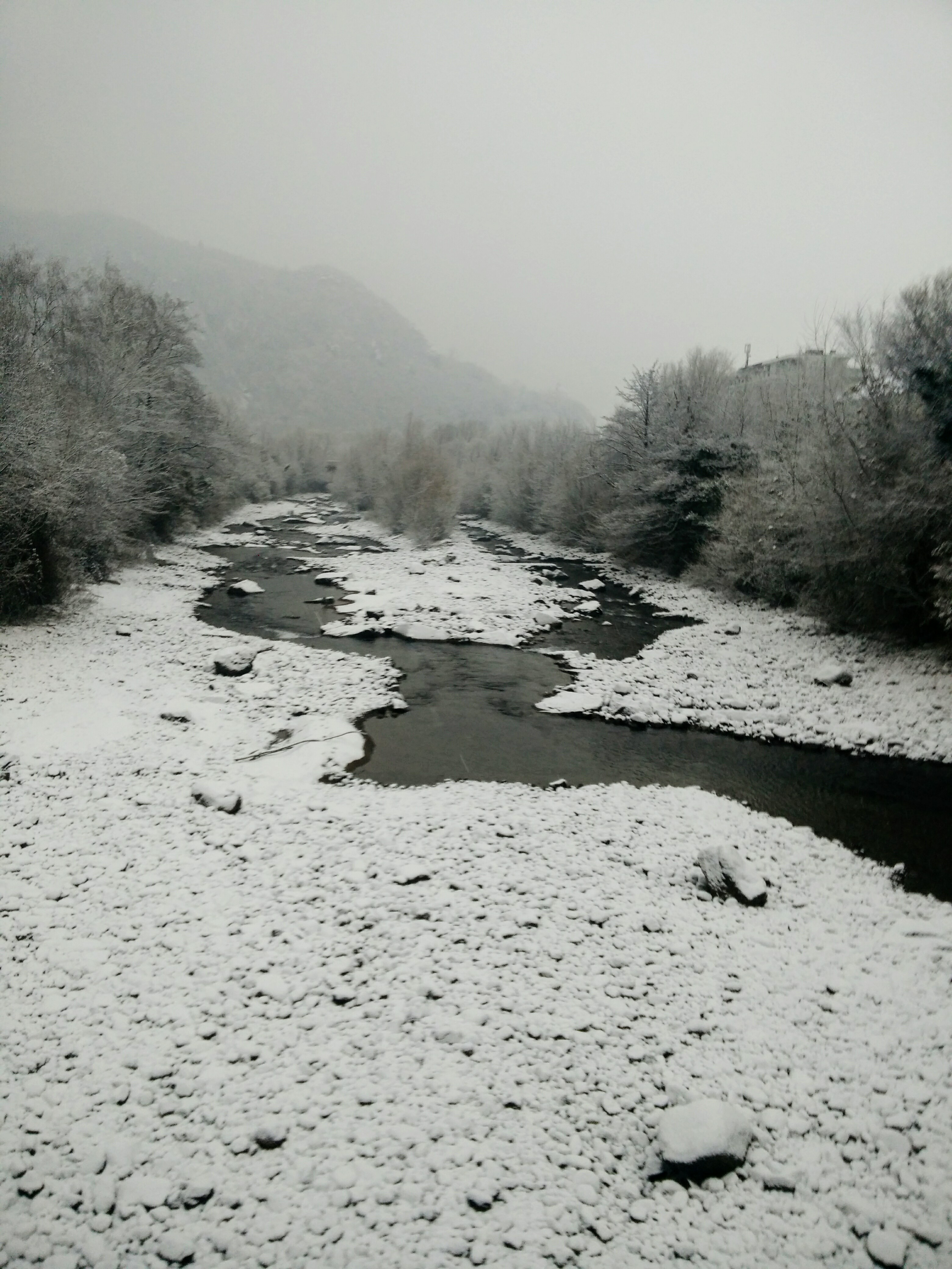 Torrente Talvera con neve. Foto scattata dal ponte pedonale del Museion.